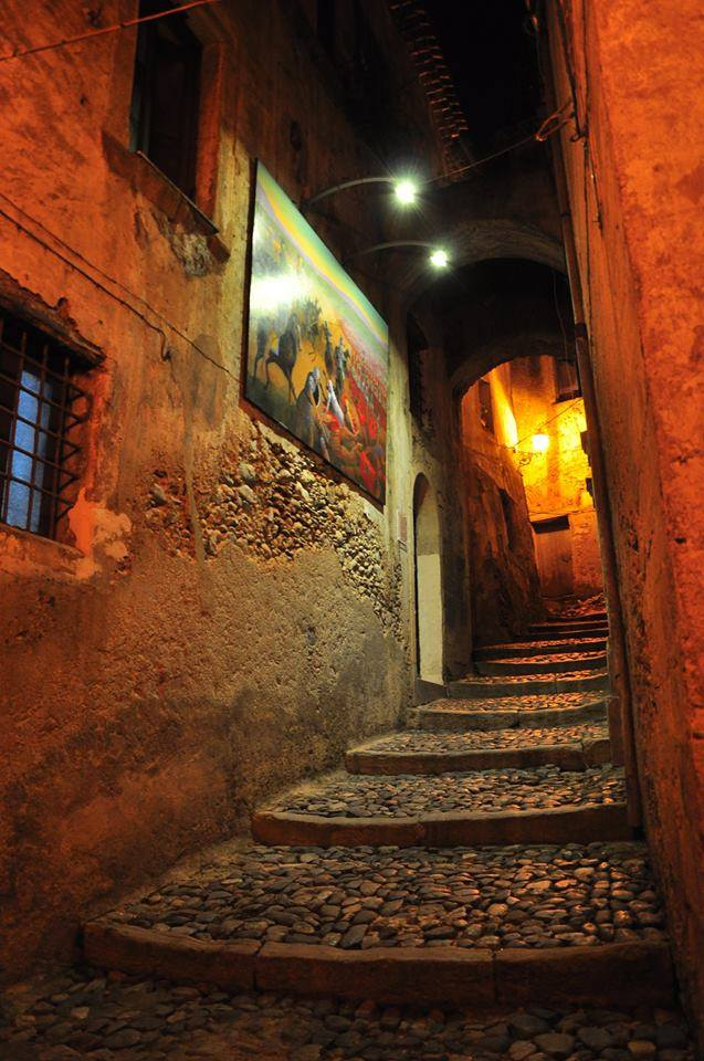 Opera del museo all'aperto nel centro storico di Cosenza